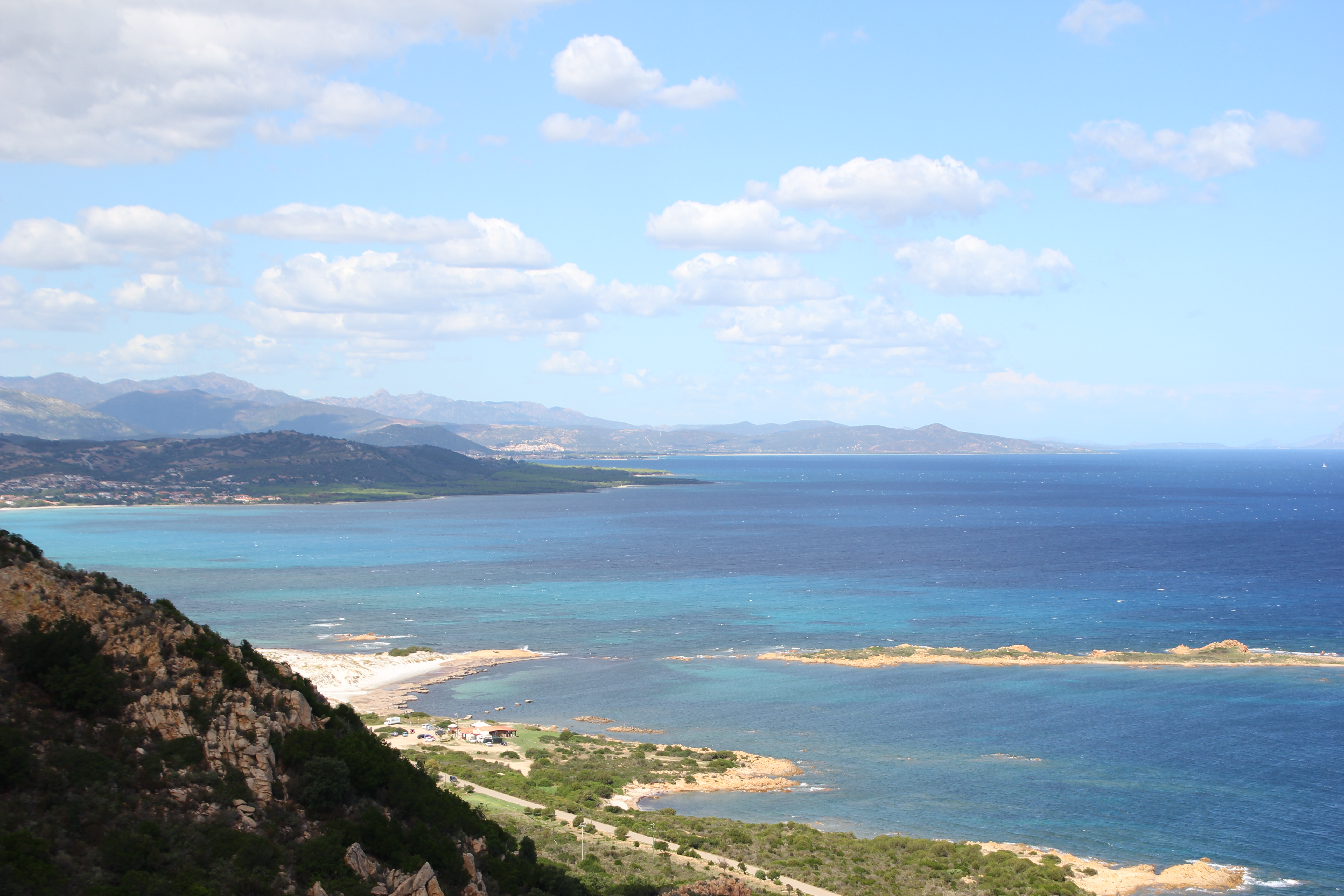 Siniscola - Capo Comino